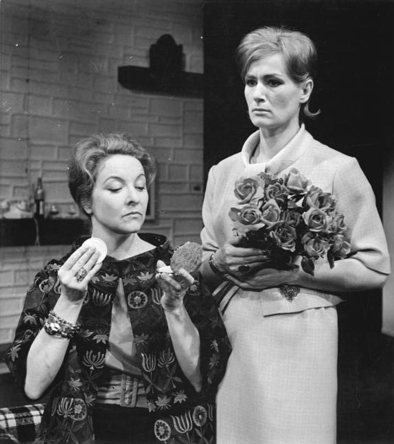 Zentralbild-Hochneder 23.4.1960 Premiere des Schauspiels "Weißes Blut" in den Berliner Kammerspielen. Am 26.4.1960 findet in den Kammerspielen des Deutschen Theaters in Berlin die Premiere des Schauspiels "Weißes Blut" von Harald Hauser statt. Die Inszenierung besorgte Wolfgang Heinz. UBz: Eine Szene aus dem Schauspiel. Auguste Parochlitz (Lisa Machliner) und ihre Tochter Eleonore von der Lohe (Inge Keller).